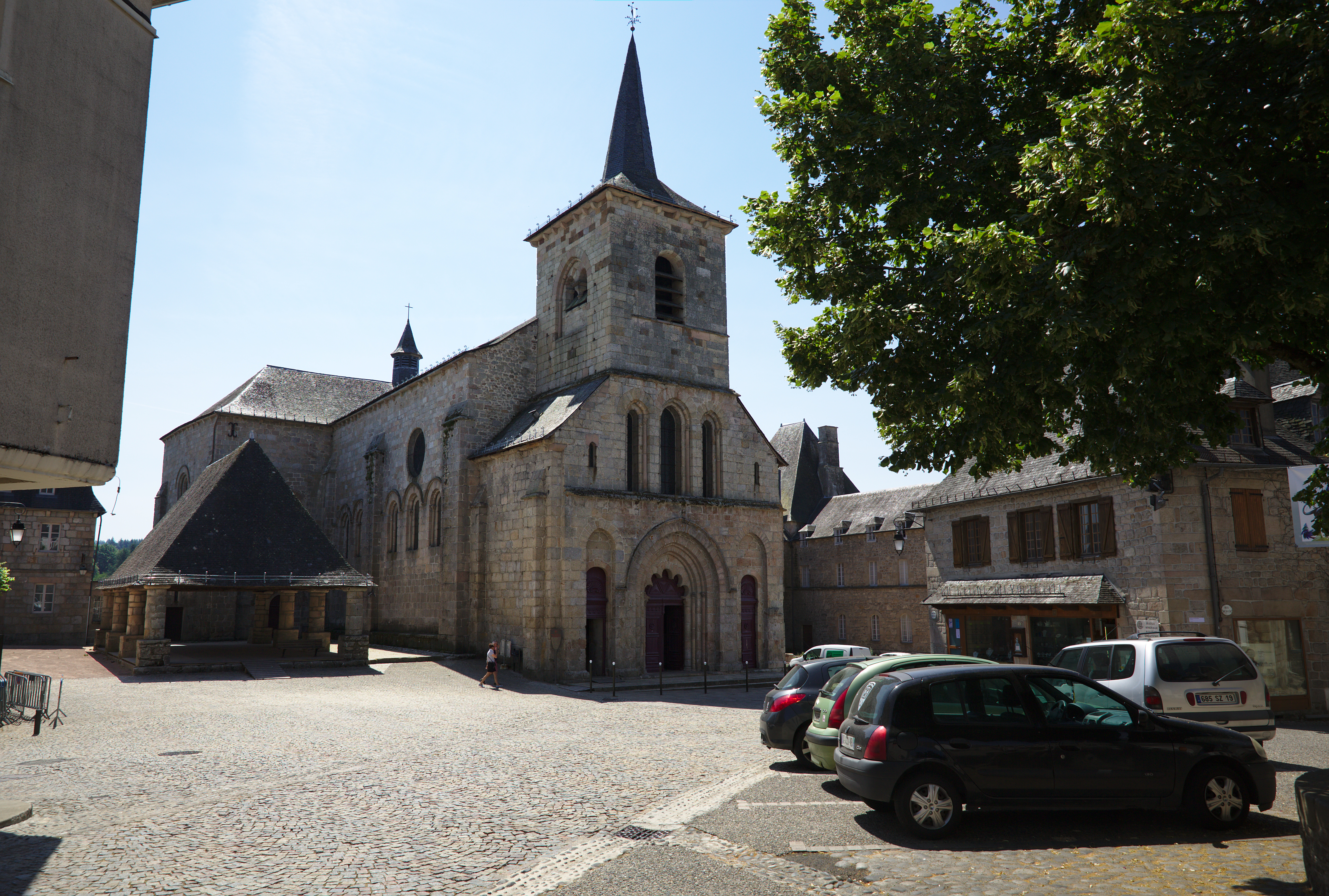 Abbaye de Meymac